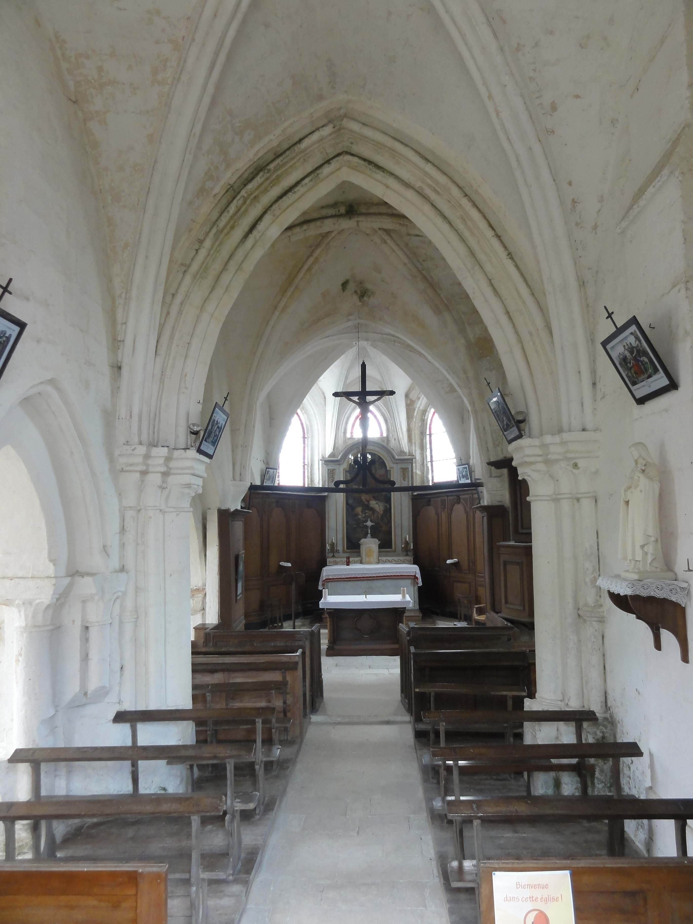 Intérieur de l'église (voir titre).